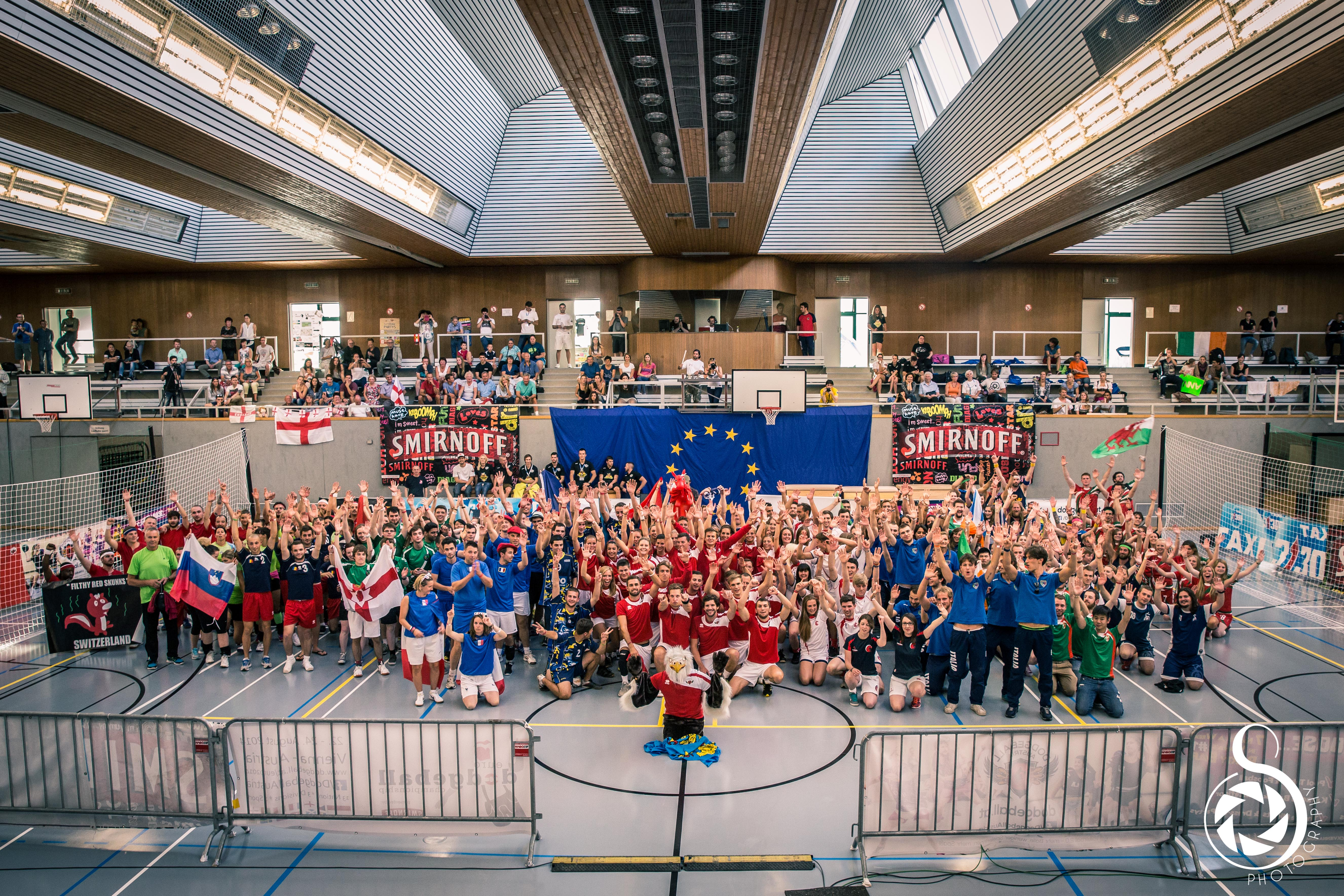 EUROS Vienna 2014